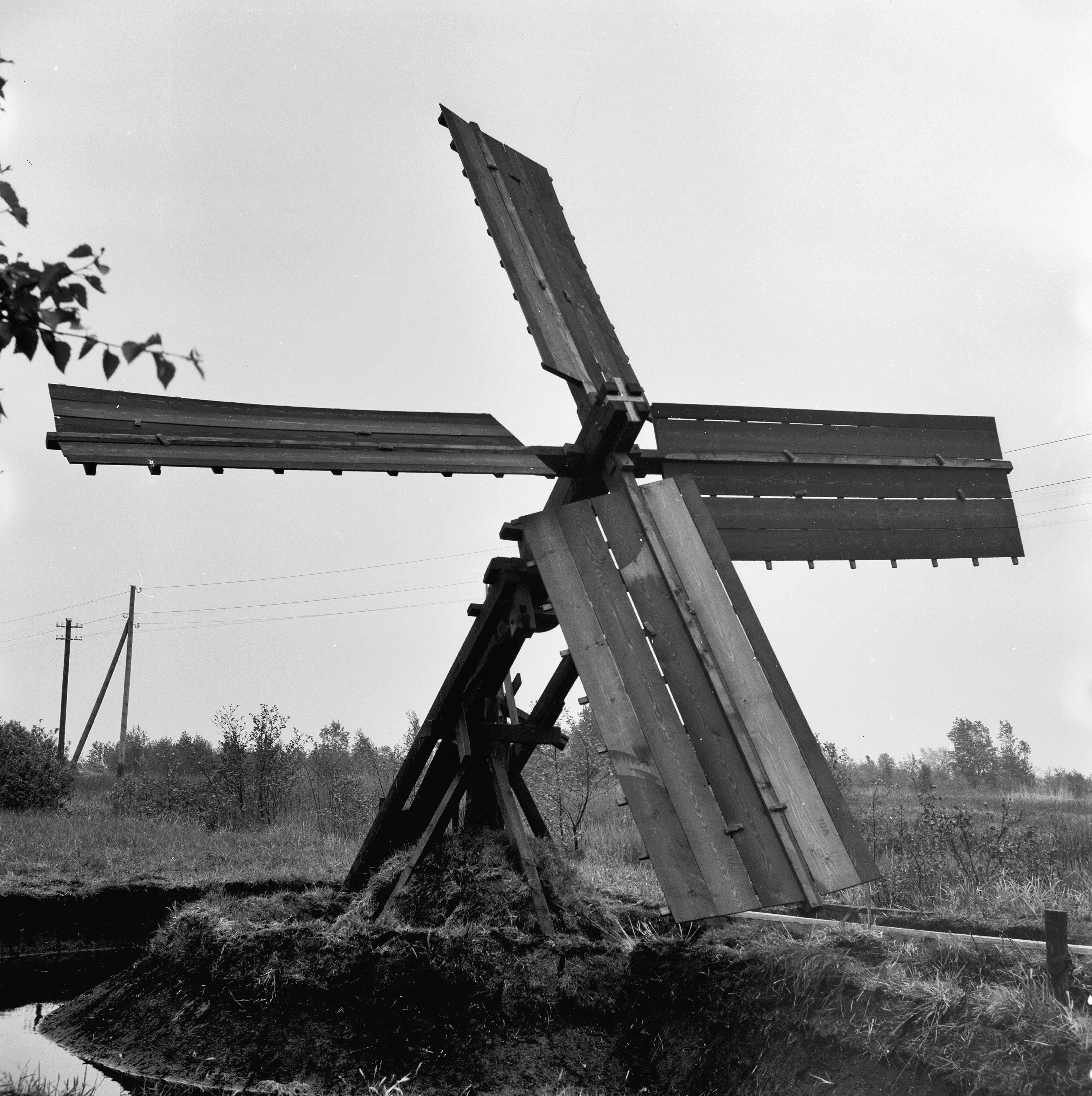 Diversen: Tjasker in het rietland